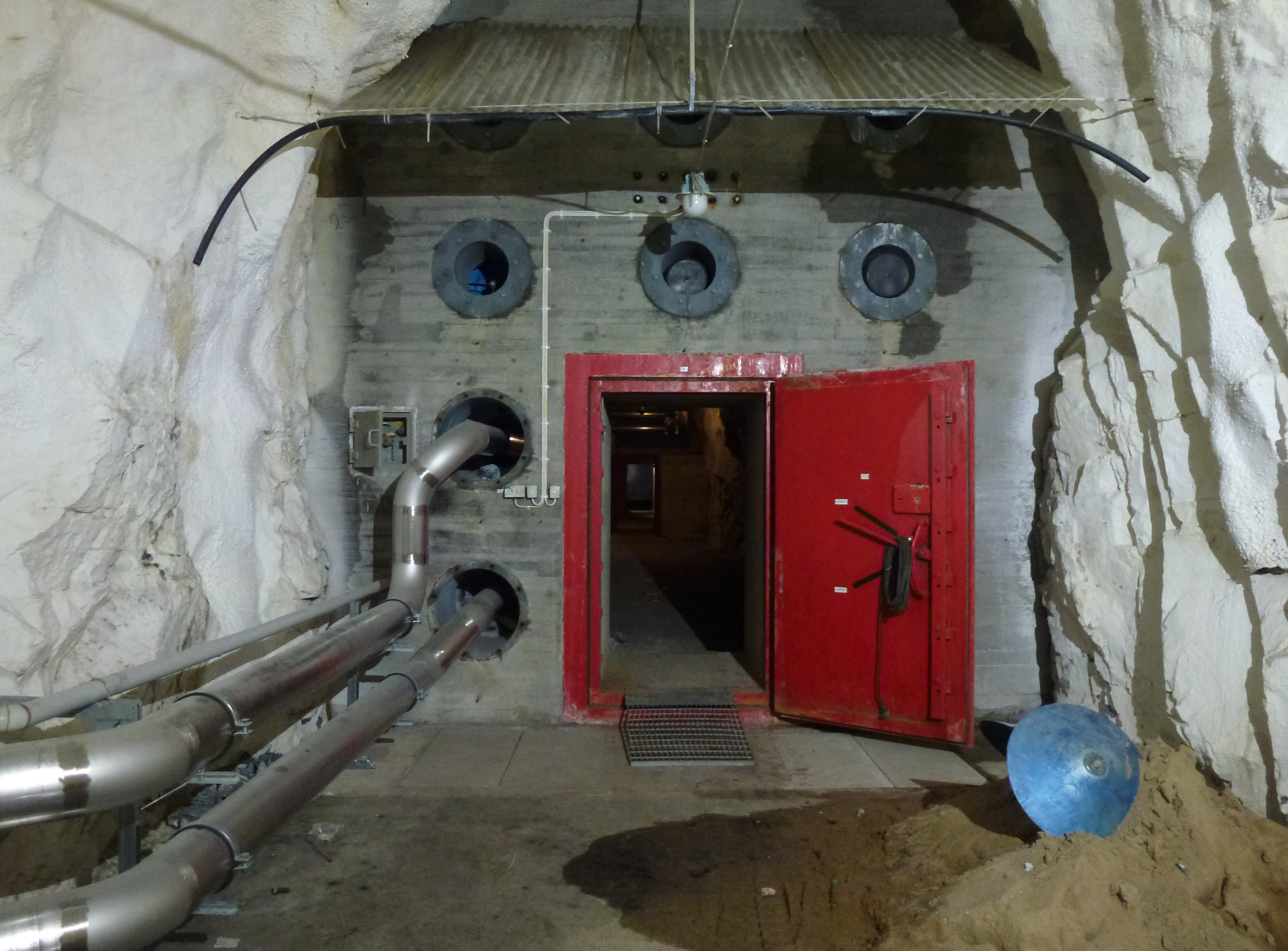 Ledningscentralen "Vargen" i Huddinge, stötvågsbarriär